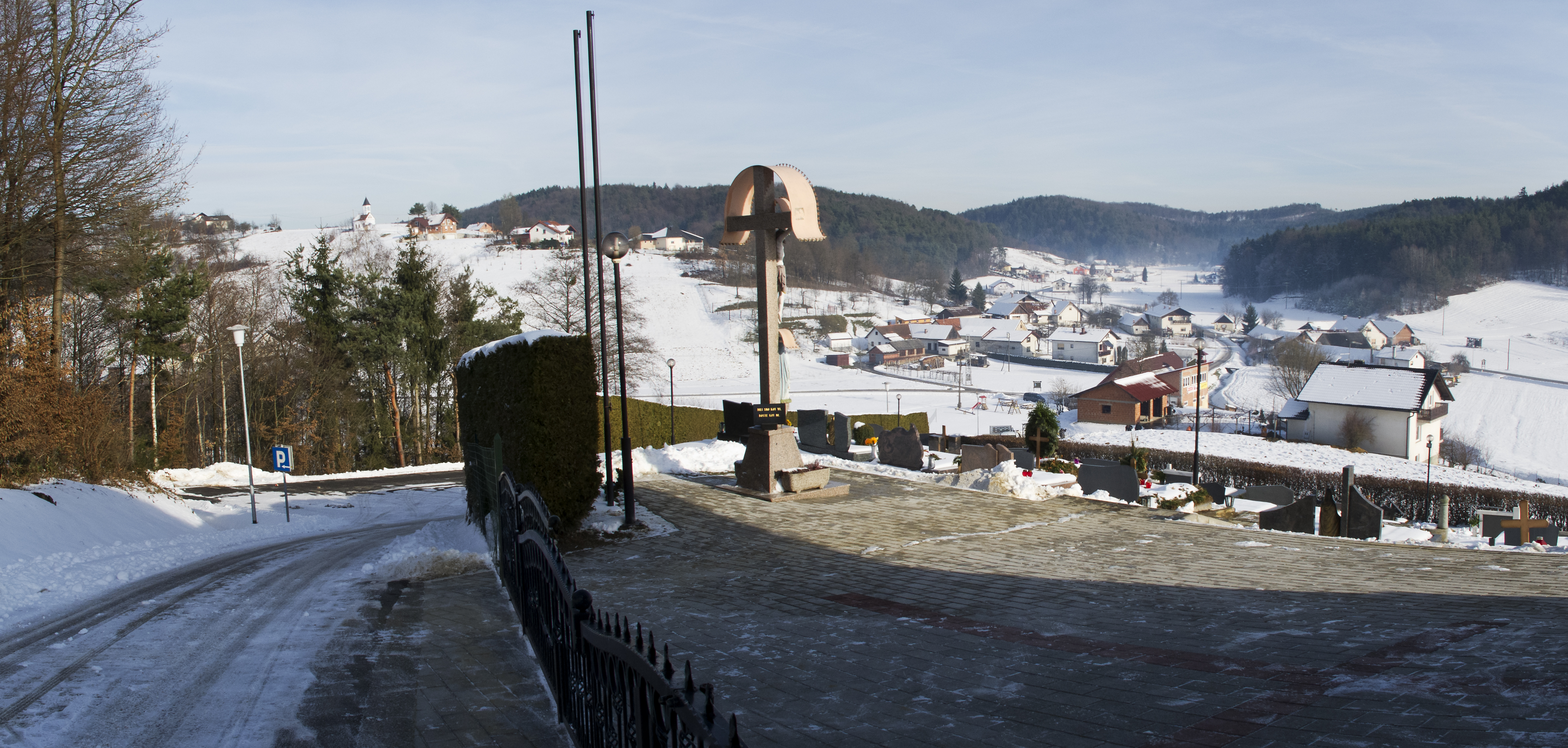 Matjaševci